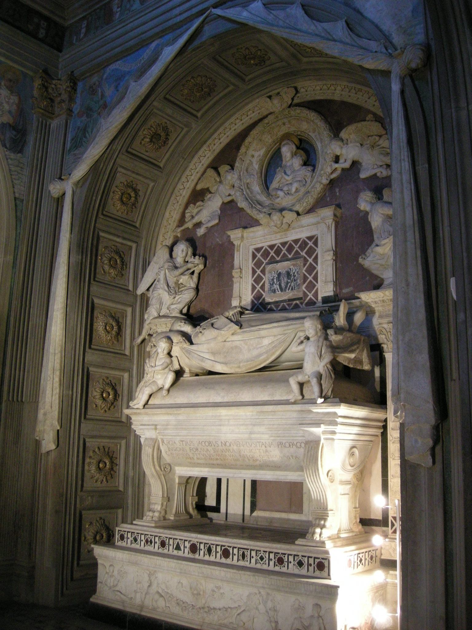 Cappella del cardinale di portogallo 03 tomba del cardinale di antonio e barnardo rossellino 01